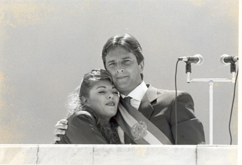 O presidente Fernando Collor, e sua esposa Rosane, no parlatório do Palácio do Planalto.